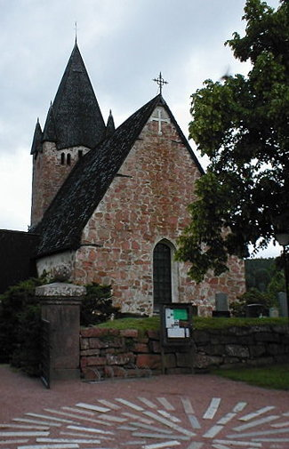 Kirche von Finström, bearbeitete Version von File:Finstroms kyrka aland.jpg